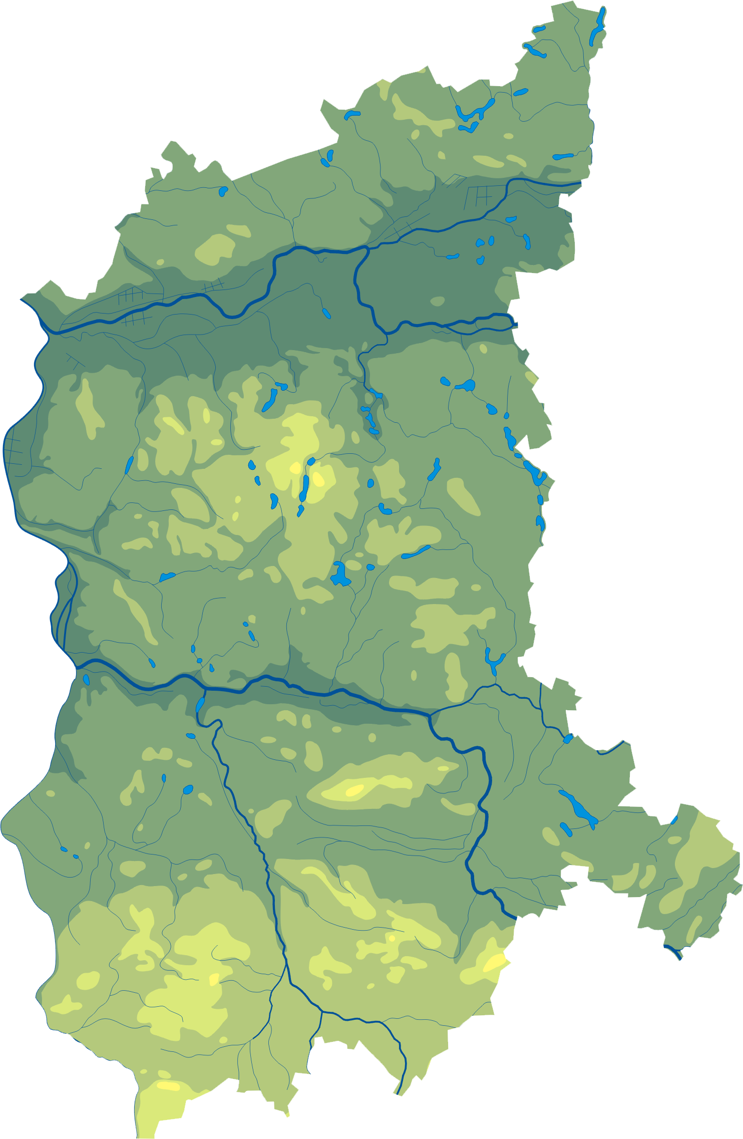 Mapa wód i ukształtowania powierzchni województwa lubuskiego. Autor: AotearoaWspółrzędne graniczne mapy: N: 53.1239° N S: 51.3635° N W: 14.5357° E E: 16.4169° E Legenda